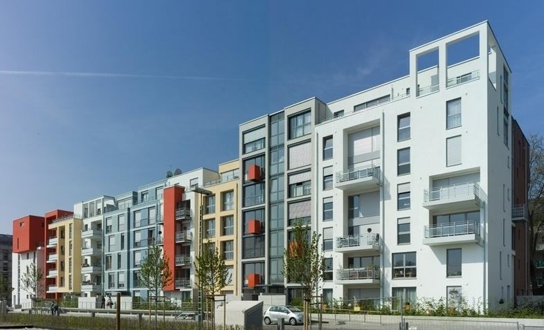 Interboden Bauprojekt, Quartis les Halles, Düsseldorf